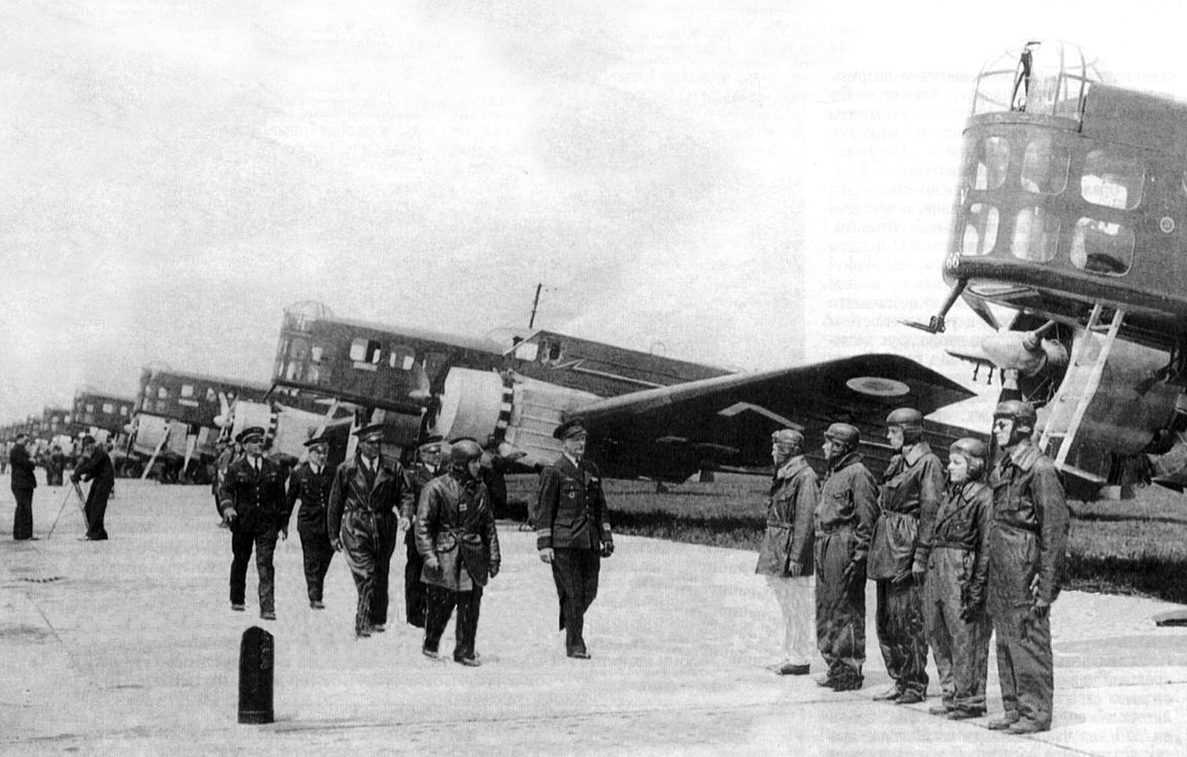 Un gruppo di bombardieri Bloch 210.